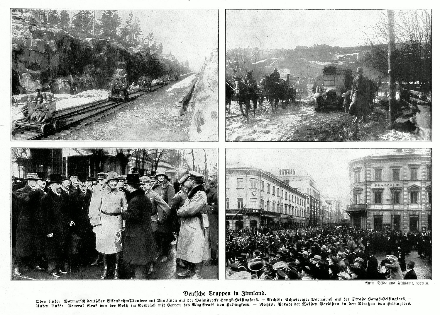 Deutsche Truppen in Finnland 1918.